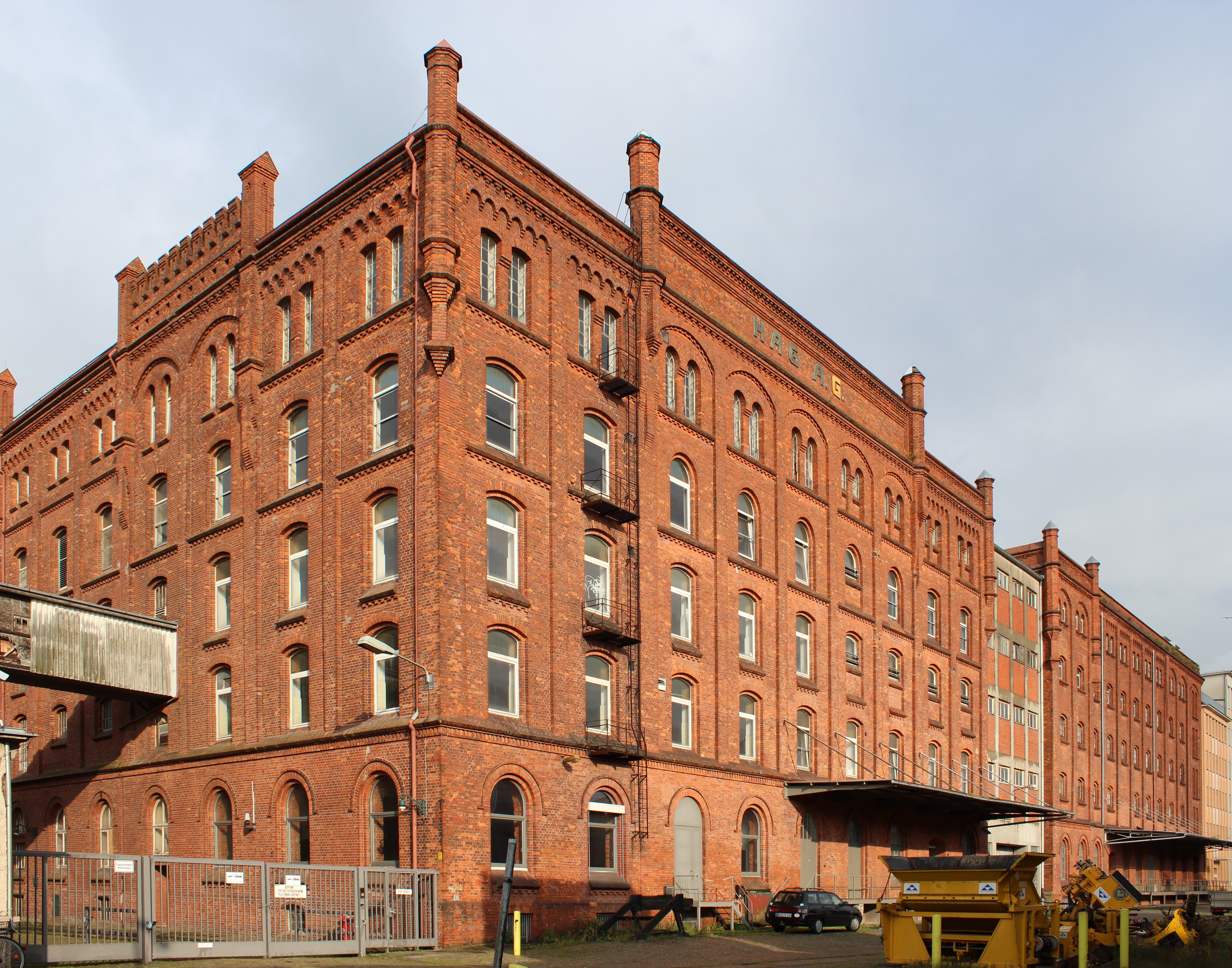 Ölmühle Groß-Gerau-Bremen, Kaffee Hag, Kaffee-HAG-Werk II in Bremen, Cuxhavener Straße 28 / Fabrikenufer, Hagstraße.Das abgebildete Objekt ist ein geschütztes Kulturdenkmal in der Freien Hansestadt Bremen, mit der Nr. 1778 beim Landesamt für Denkmalpflege registriert.